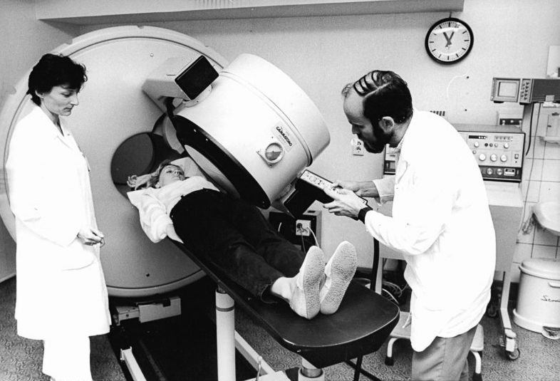 Schwerin, Bezirkskrankenhaus, Computertomograf ADN-ZB Pätzold-21.9.89 Schwerin: Bezirkskrankenhaus- 50 verschiedene Untersuchungsverfahren für nahezu 40.000 Patienten im Jahr - vorwiegend bei Schilddrüsen-, Nieren-, Herz- und Skeletterkrankungen - werden im Bezirkskrankenhaus Schwerin durchgeführt. Dipl.-Mathematiker Martin Meyer und Marianna David, Fachassistentin für Nuklearmedizin, arbeiten an einem Emissionscomputertomografen, der für die Herzdiagnostik eingesetzt wird. - Siehe auch 1989-0921-12 N, 13 N und 15 N.